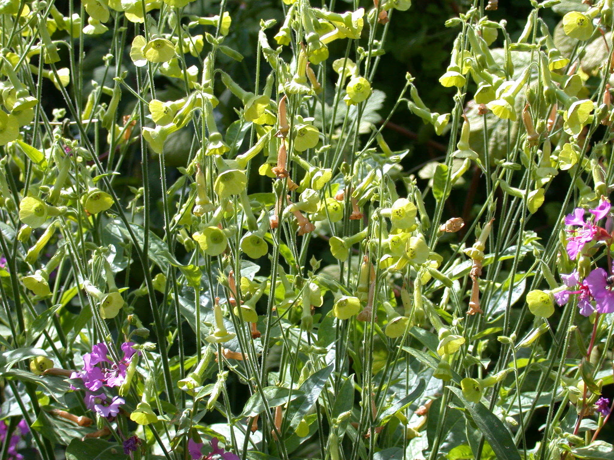 Specimen labelled: "Nicotiana langsdorfii Wein. Brazil."